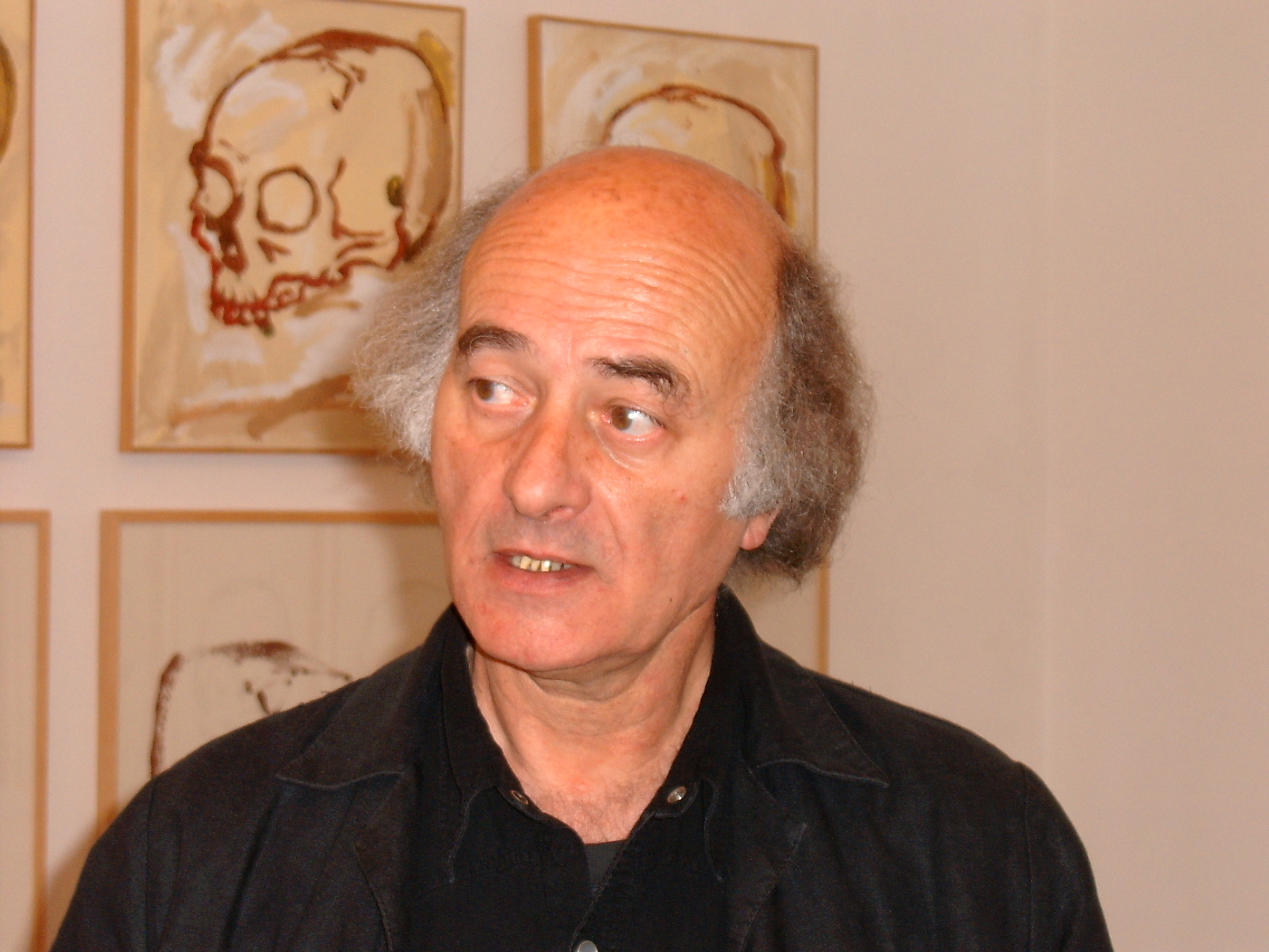 portrait de Gérard Titus-Carmel